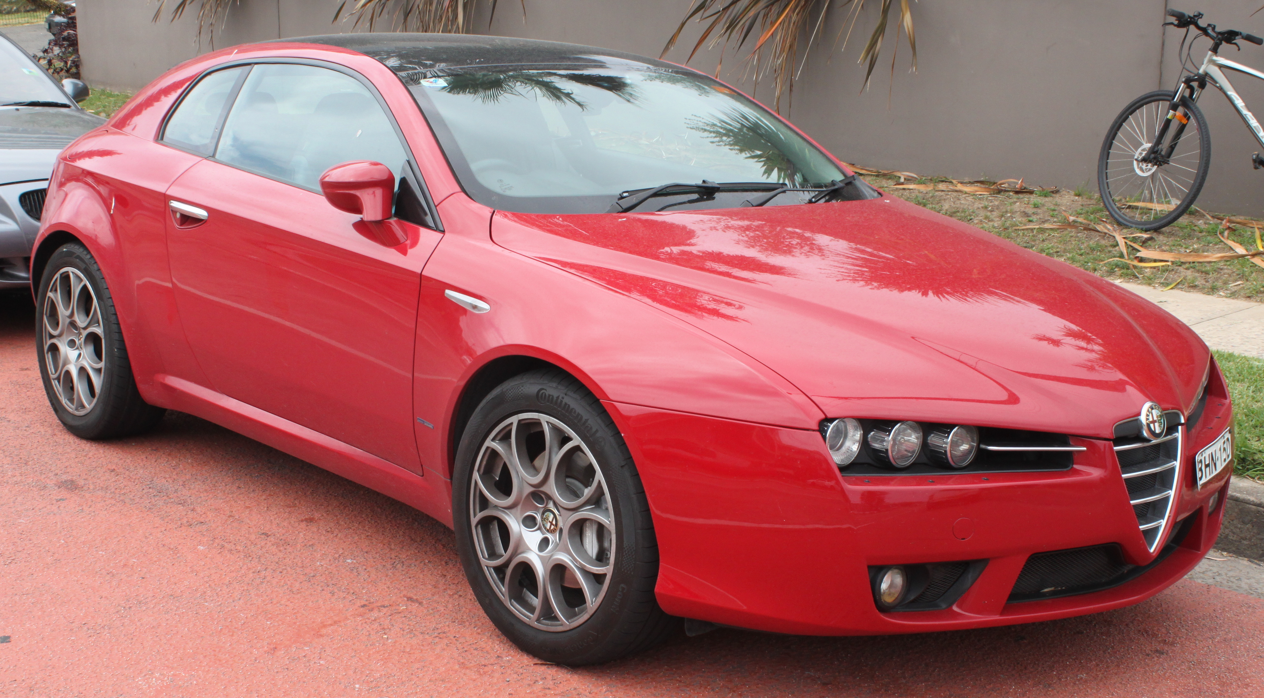 Alfa Romeo Brera